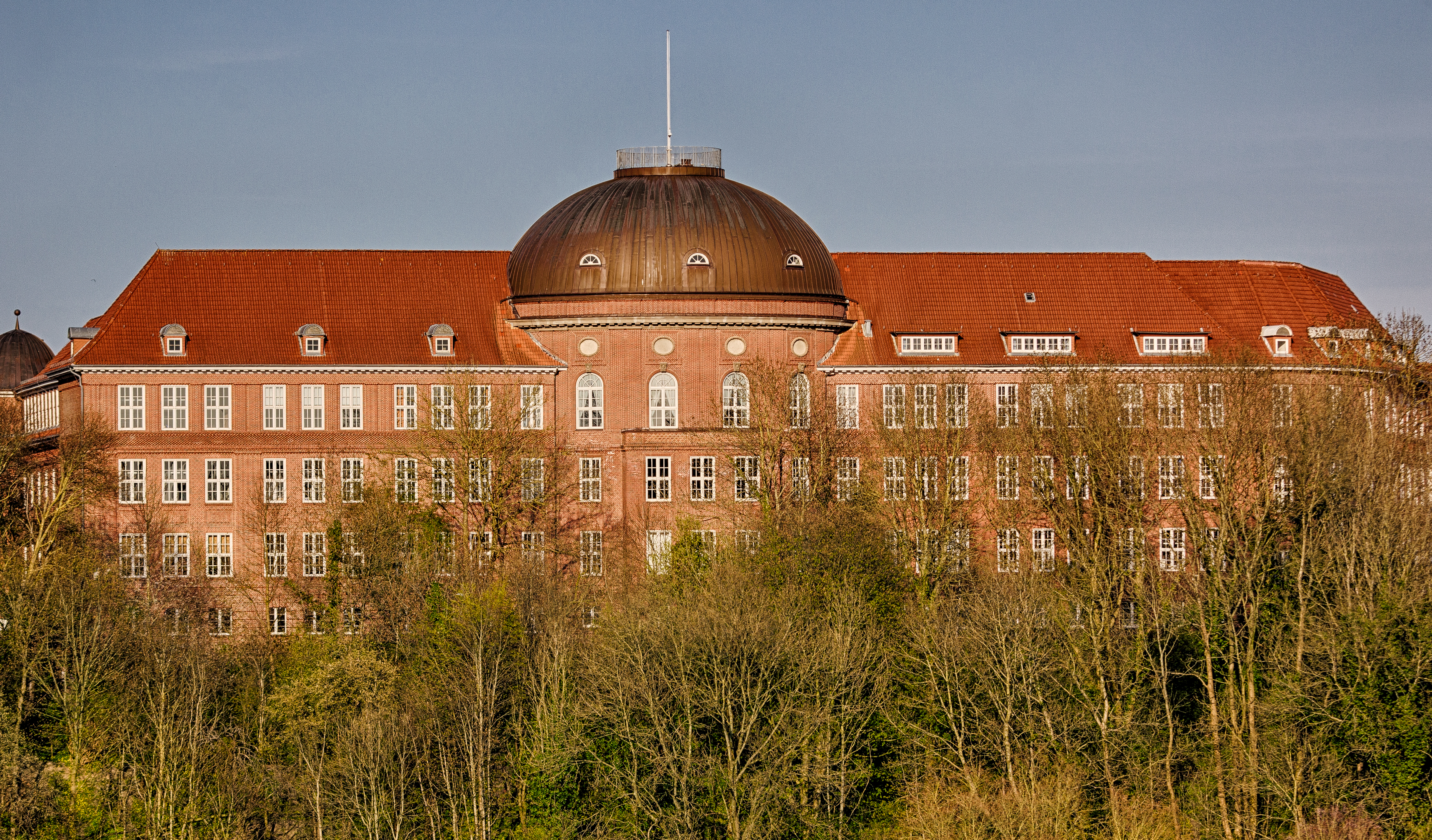 Die Goethe Schule in Flensburg. (2015) (HDR)